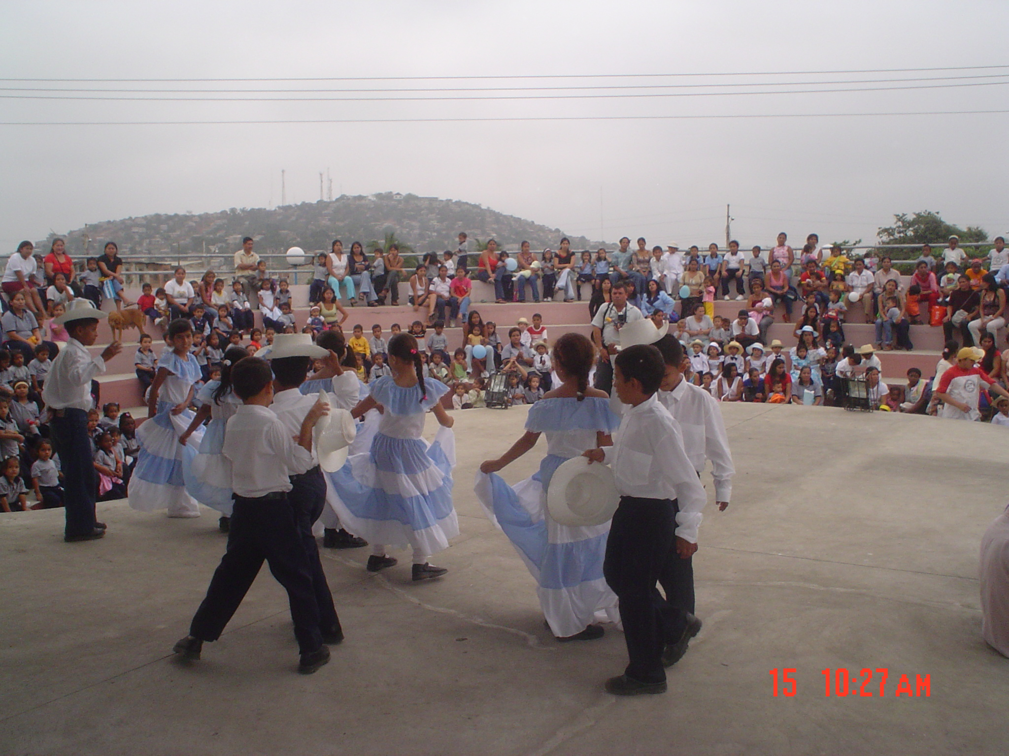 Niños en baile típico de Guayaquil, en el ágora del Centro Polifuncional de Bastión Popular. Al fondo se ve la parte alta de Bastón Popular. Autor: Zumar-Alfredobi Lugar: Bastión Popular - Guayaquil Fecha: Lujio 2005